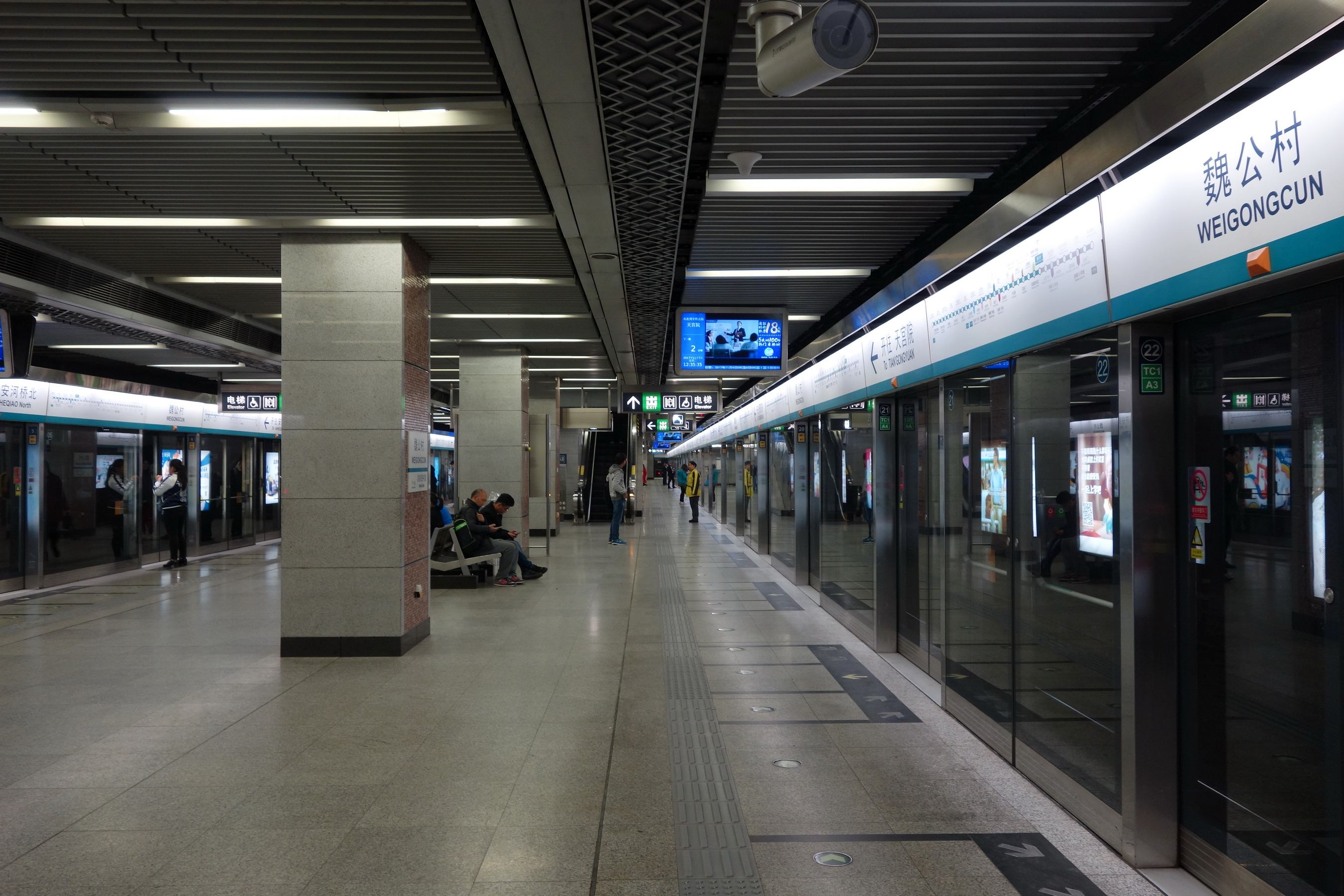 北京地铁4号线魏公村站岛式站台